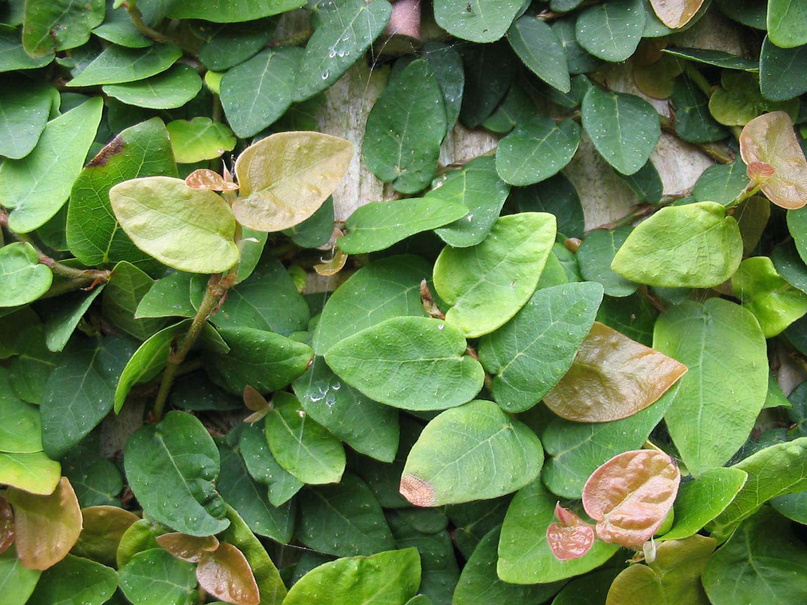 Kletterfeige (Ficus pumila) - Leafs